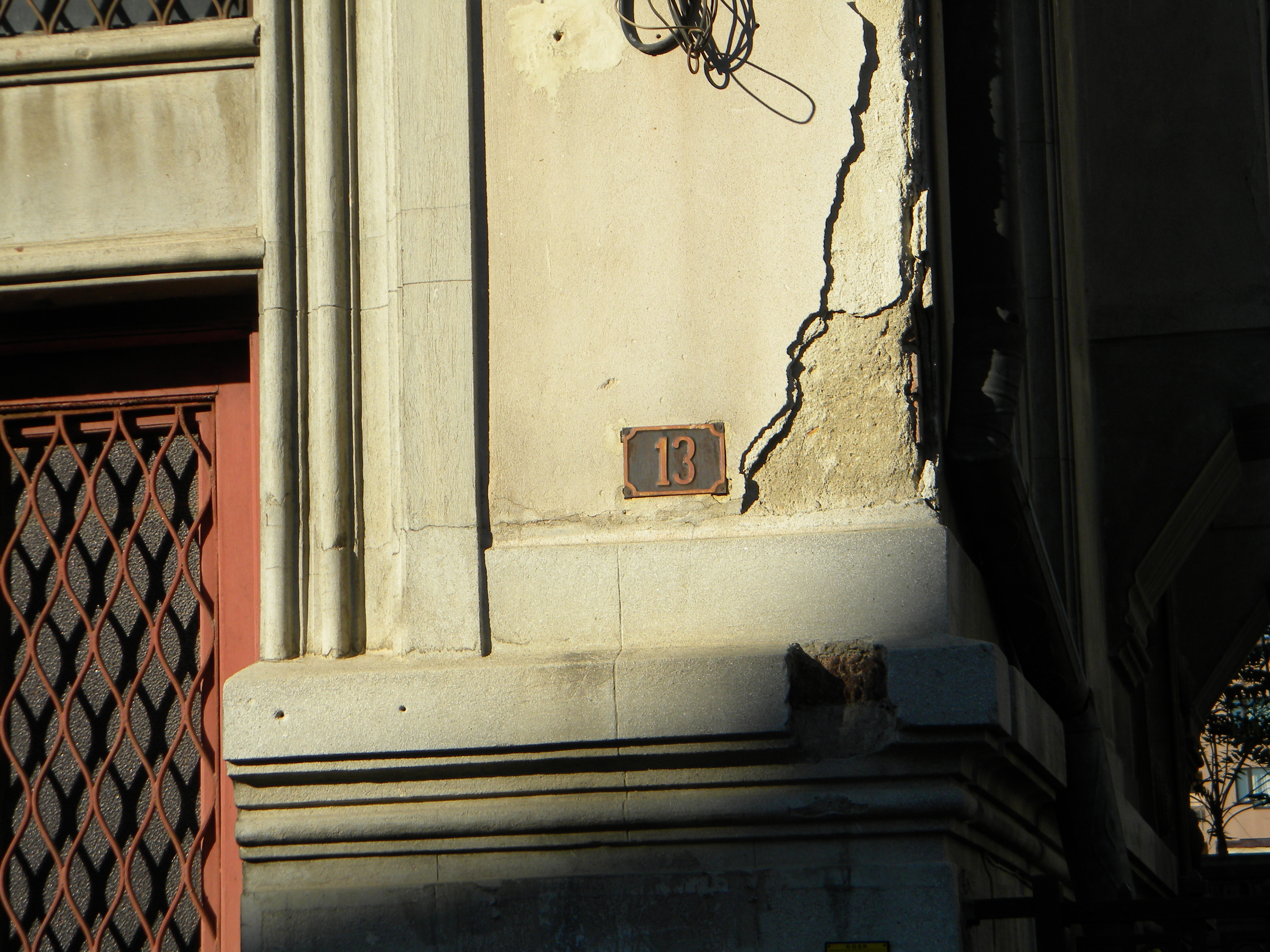 Bucuresti, Romania, Str. Alexandru Philippide, nr. 13, sect. 2, (cod B-II-m-B-19382) (3 prim)